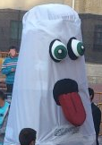 El gegant Fantasma Jaumet durant la cercavila de la Festa Major de Montclar d'Urgell 2012